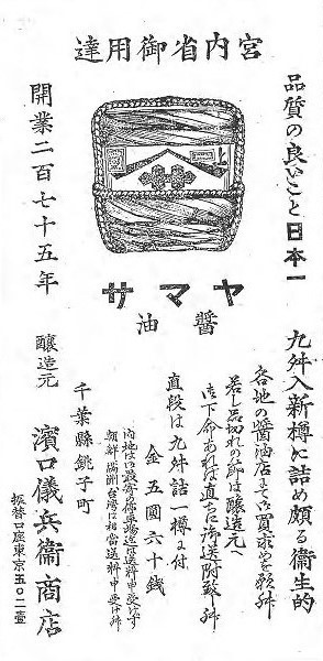 ヤマサ醤油広告